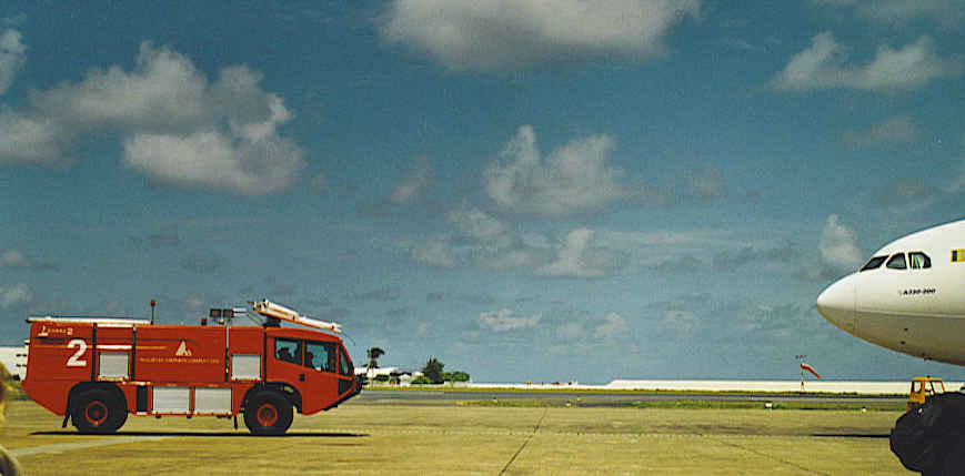 Flughafenfeuerwehr Aufnahmeort: Malé